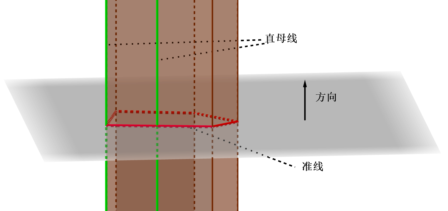 中文（中国大陆）: 这张图片以棱柱为例，展示了柱面的直母线、准线和方向的概念。